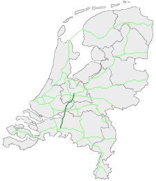 Locatie E311 (A27 Ut-Bd), zelf gemaakt